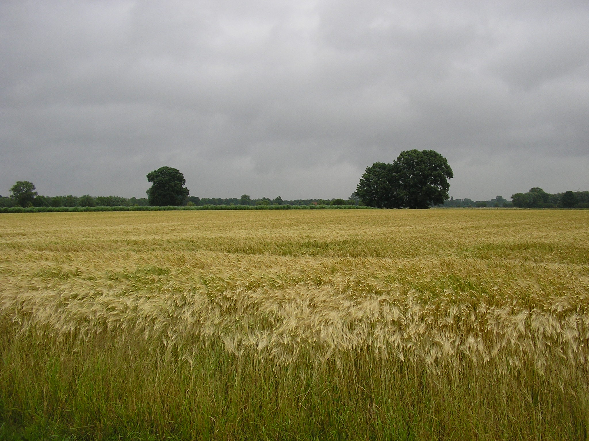 Fluren im Lübbecker Norden